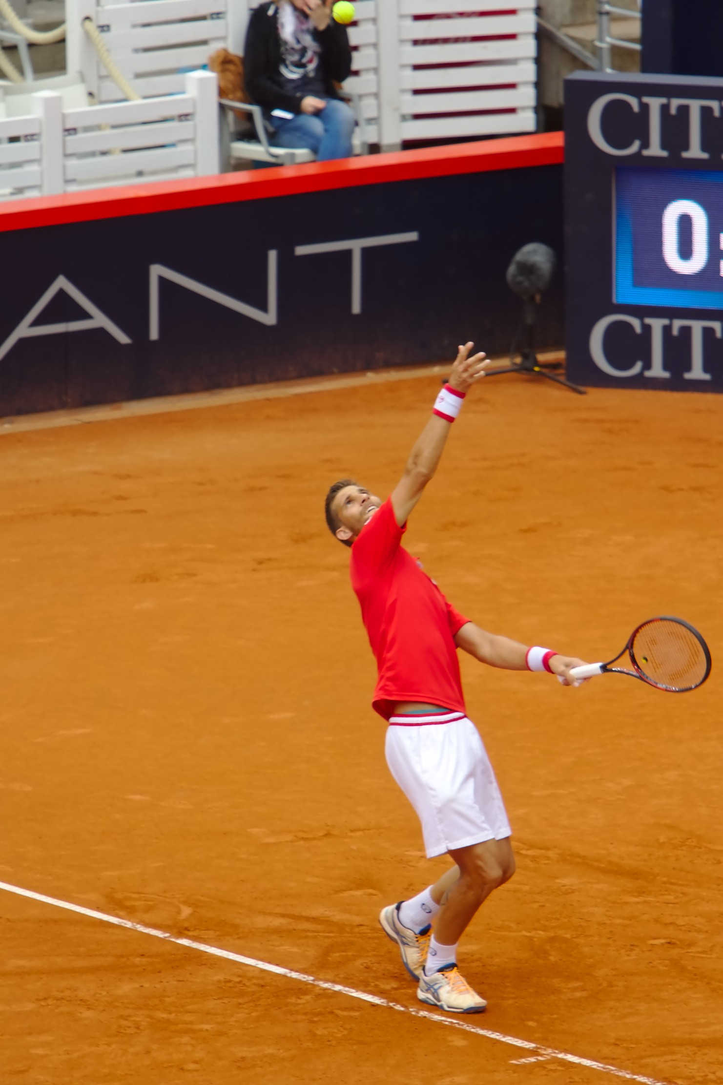 Martin Kližan im Halbfinale der German Open 2016 in Hamburg Rothenbaum